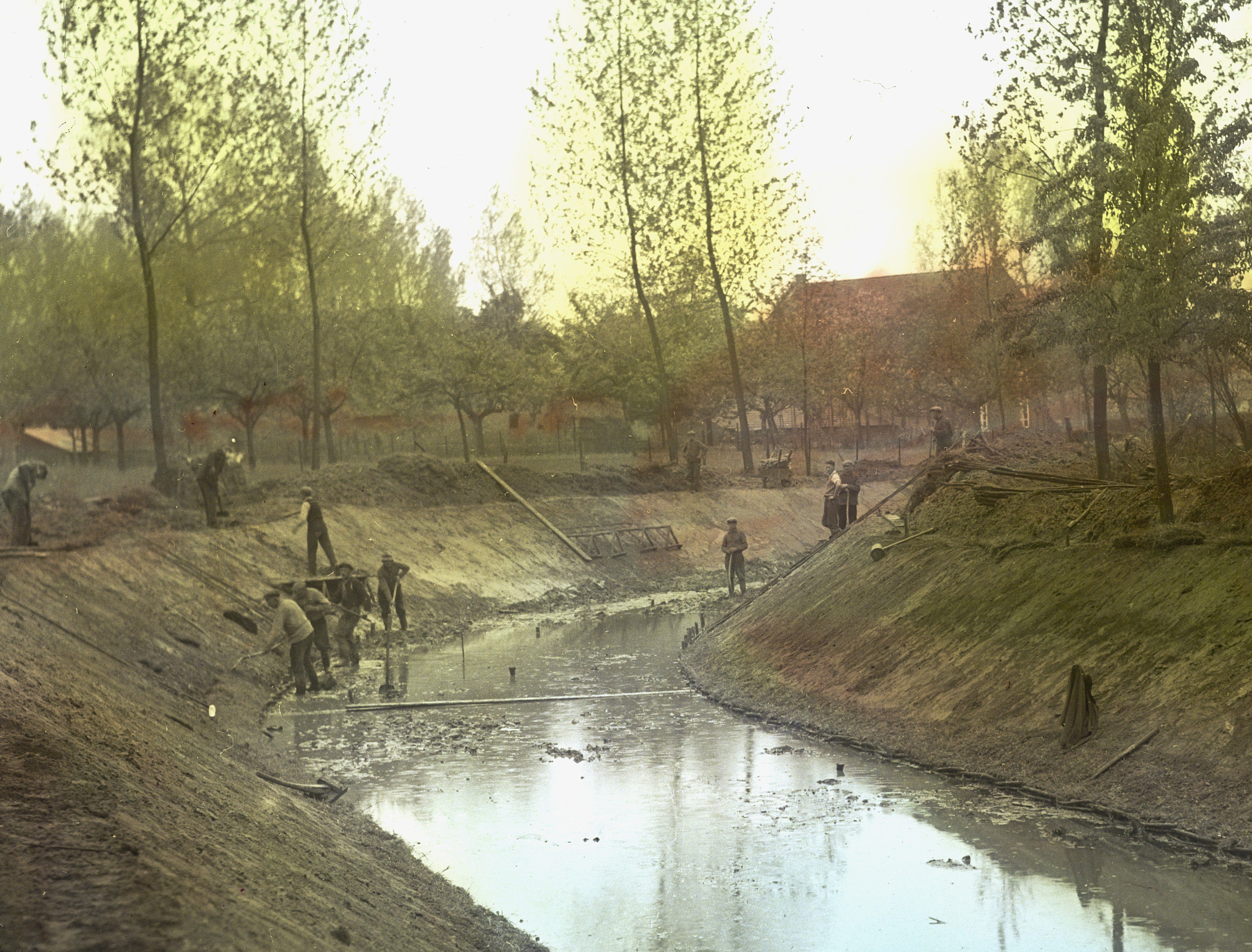 Collectie / Archief : Fotocollectie Nederlandse Heidemaatschappij Reportage / Serie : [ onbekend ] Beschrijving : ontwatering, normalisatie beken, haelense beek Datum : ongedateerd Locatie : Haelen Trefwoorden : normalisatie beken, ontwatering Persoonsnaam : haelense beek Fotograaf : [onbekend] Auteursrechthebbende : Nationaal Archief Materiaalsoort : Lantaarnplaatje (glasdia) Nummer archiefinventaris : bekijk toegang 2.24.06.02 Bestanddeelnummer : 193-1140